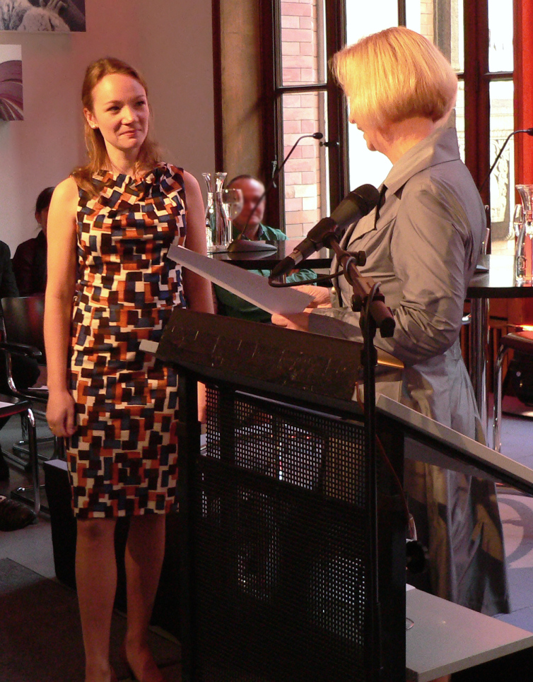 Sabrina Janesch Preisvergabe Nicolas-Born-Preis 2011